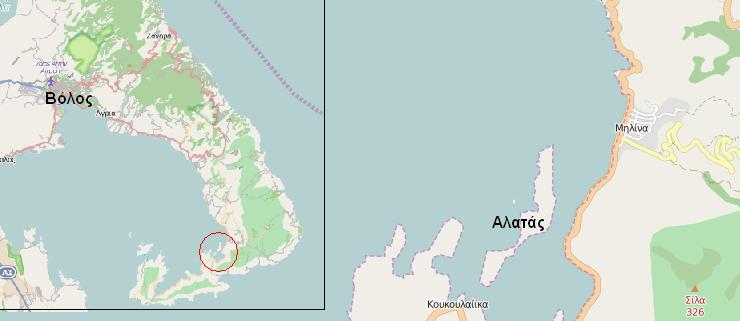 Αλατάς Μαγνησίας